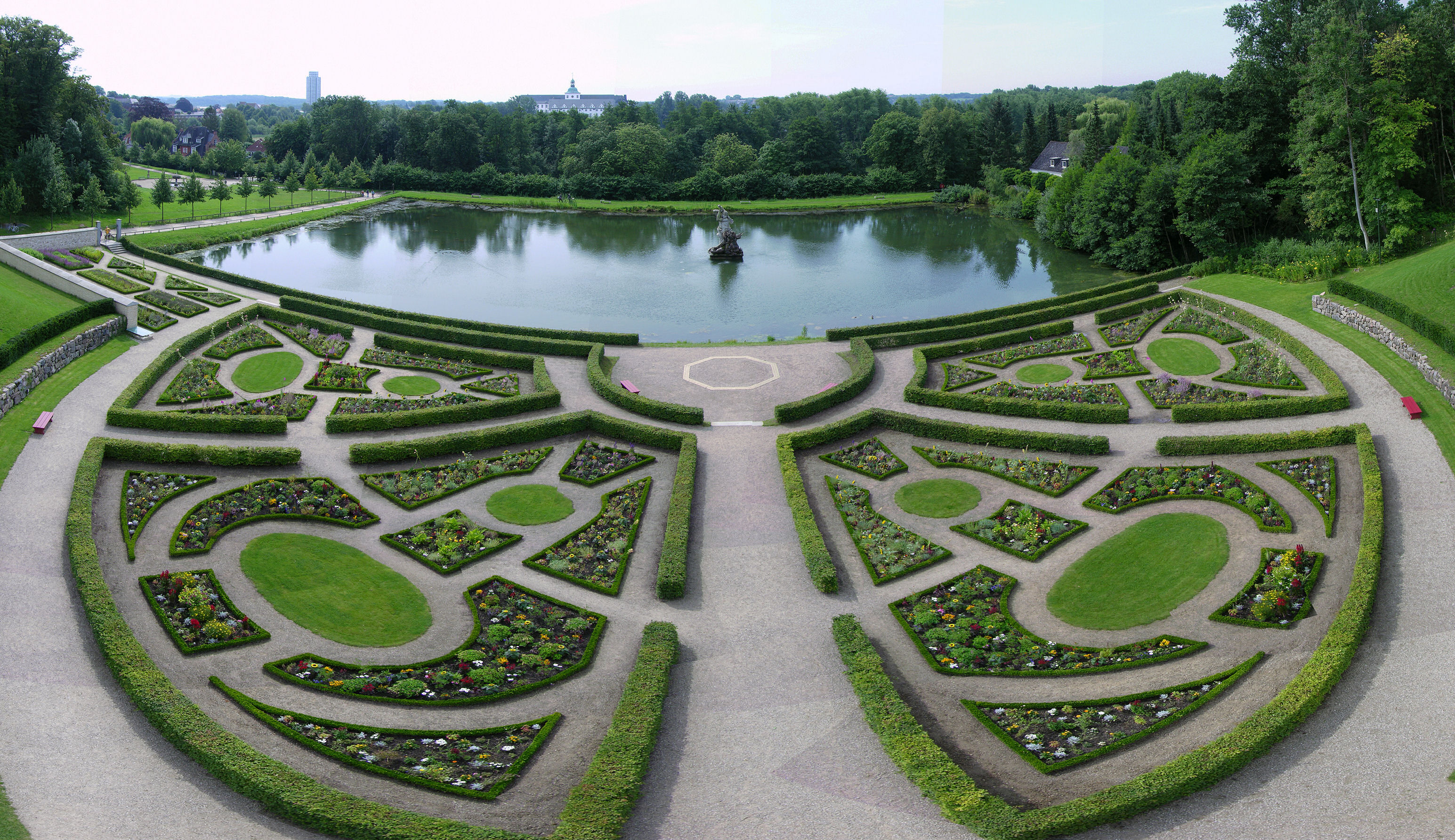 Neuwerkgarten looking south